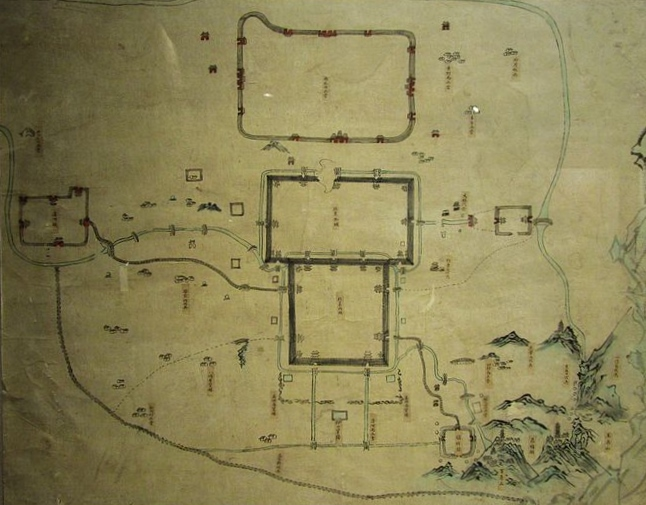 太平天国时期的京师布防图，藏于南京瞻园。